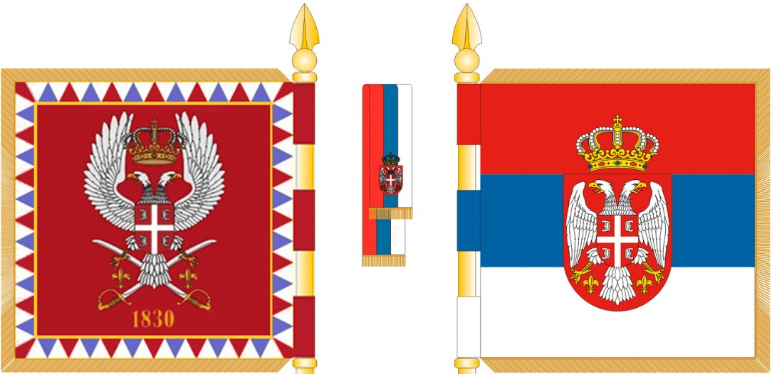 Serbian guard (Garda) Flag